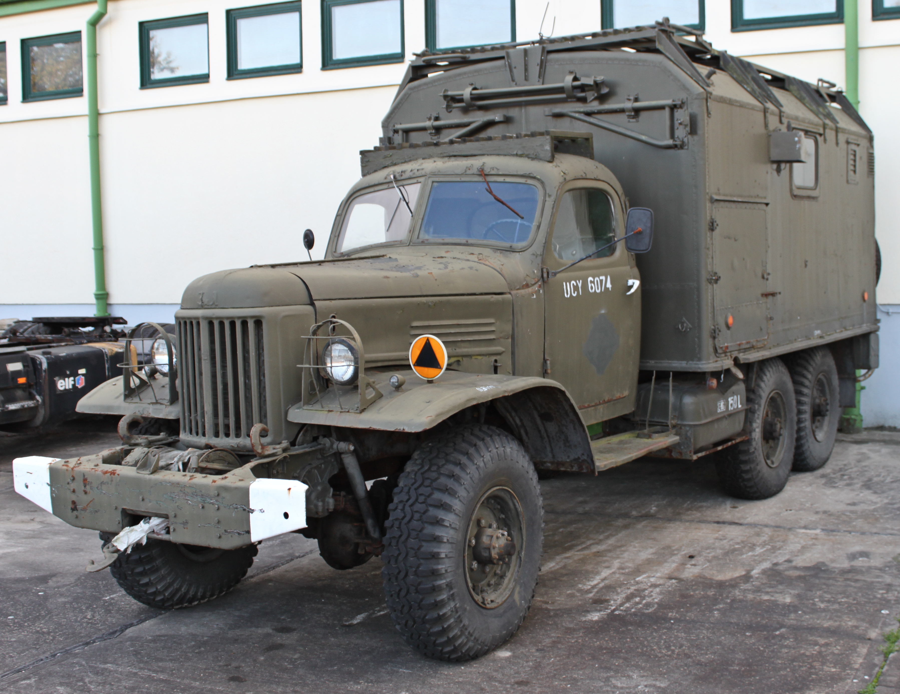 ZiL-157